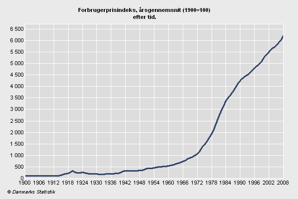 Graf over forbrugerprisindekset i Danmark. År 1900 = index 100. Kilde: Danmarks Statistik, Mindre version på :Billede:Forbrugerprisindeks_mindre.gif.